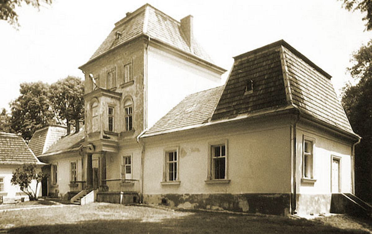 Dwór Sieraków, częśćtylnia, przed przebudową w 2006 roku